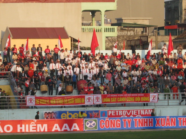 câu lạc bộ bóng đá Xi măng The Vissai Ninh Bình mùa giải 2010